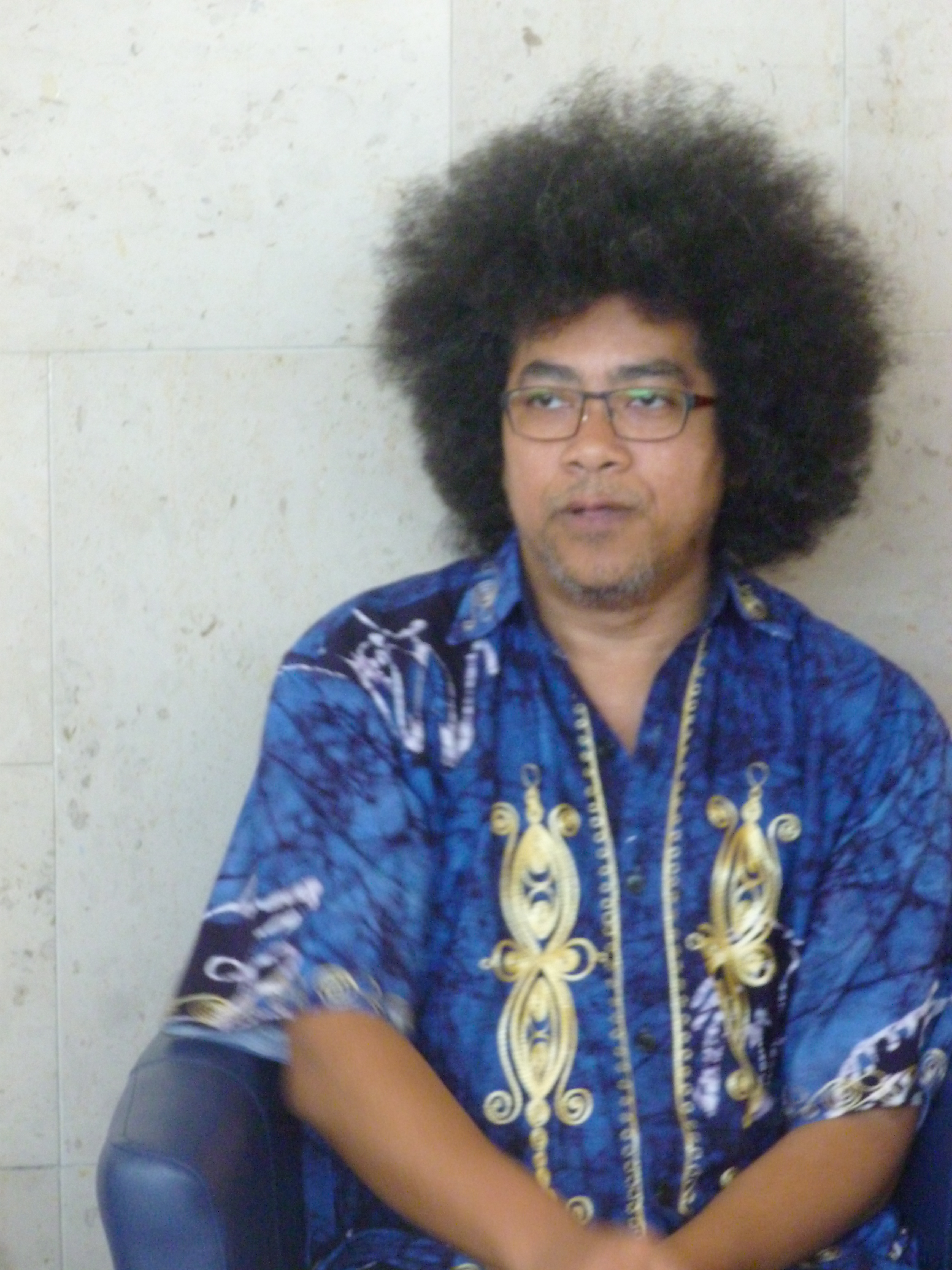 Jean-Luc Raharimanana, le 15 mars 2017, lors d'une rencontre littéraire à la Bibliothèque Lettres et Sciences Humaines de l'Université Bordeaux Montaigne